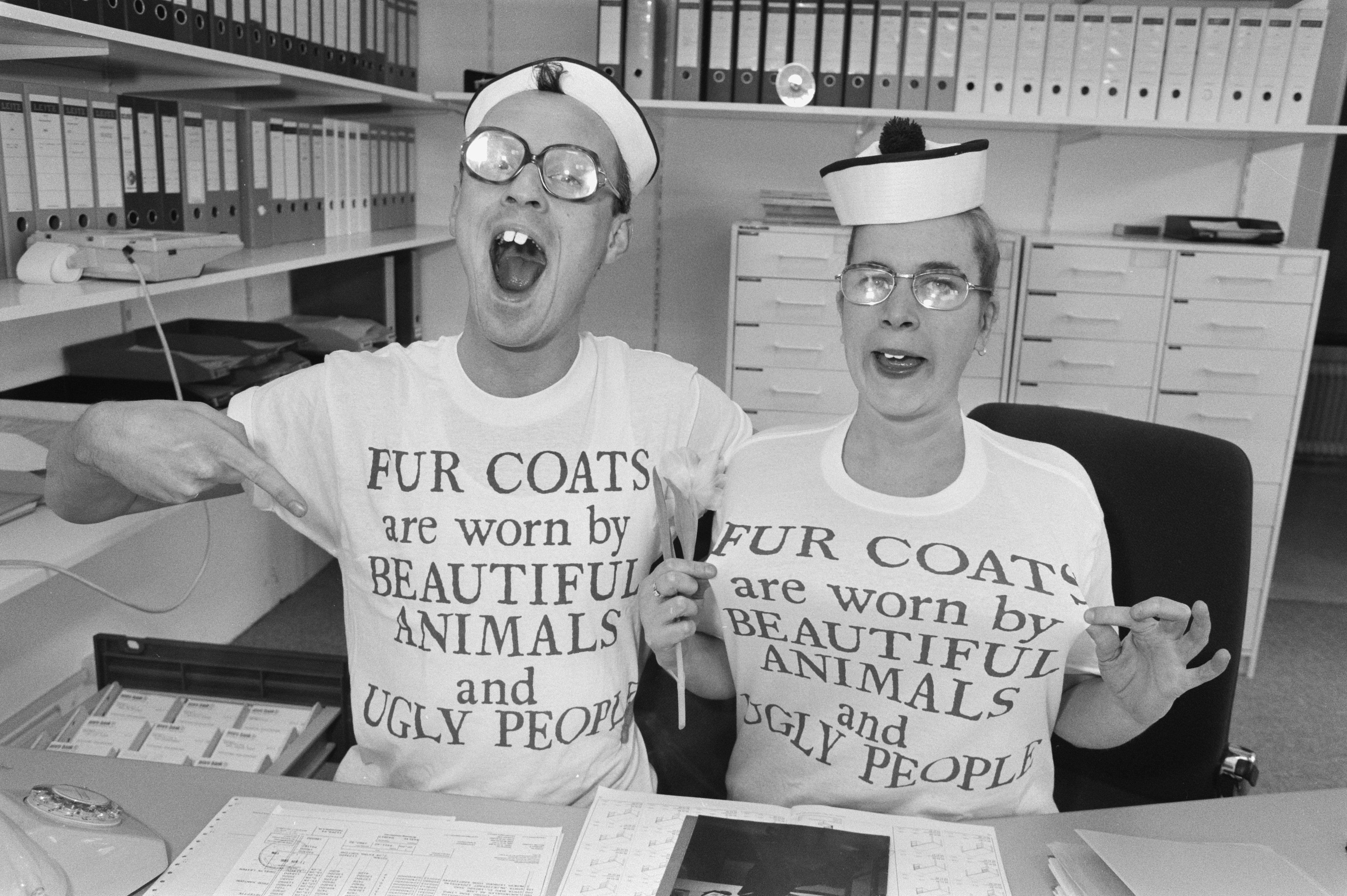 Collectie / Archief : Fotocollectie Anefo Reportage / Serie : [ onbekend ] Beschrijving : Opdracht Anti Bont Comite ; Thea en Theo Datum : 12 februari 1988 Persoonsnaam : Anti Bont Comite, THEA, THEO Fotograaf : Croes, Rob C. / Anefo Auteursrechthebbende : Nationaal Archief Materiaalsoort : Negatief (zwart/wit) Nummer archiefinventaris : bekijk toegang 2.24.01.05 Bestanddeelnummer : 934-1891